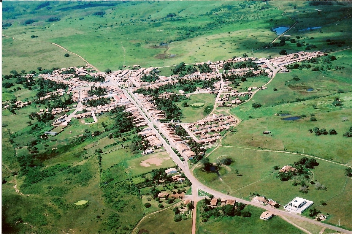 Vista de toda a sede do município de Cumbe, no estado de Sergipe, Brasil